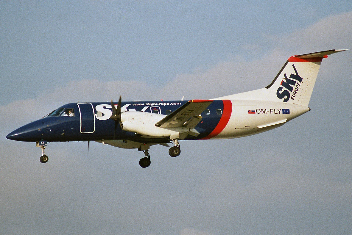 Zürich 10.2003